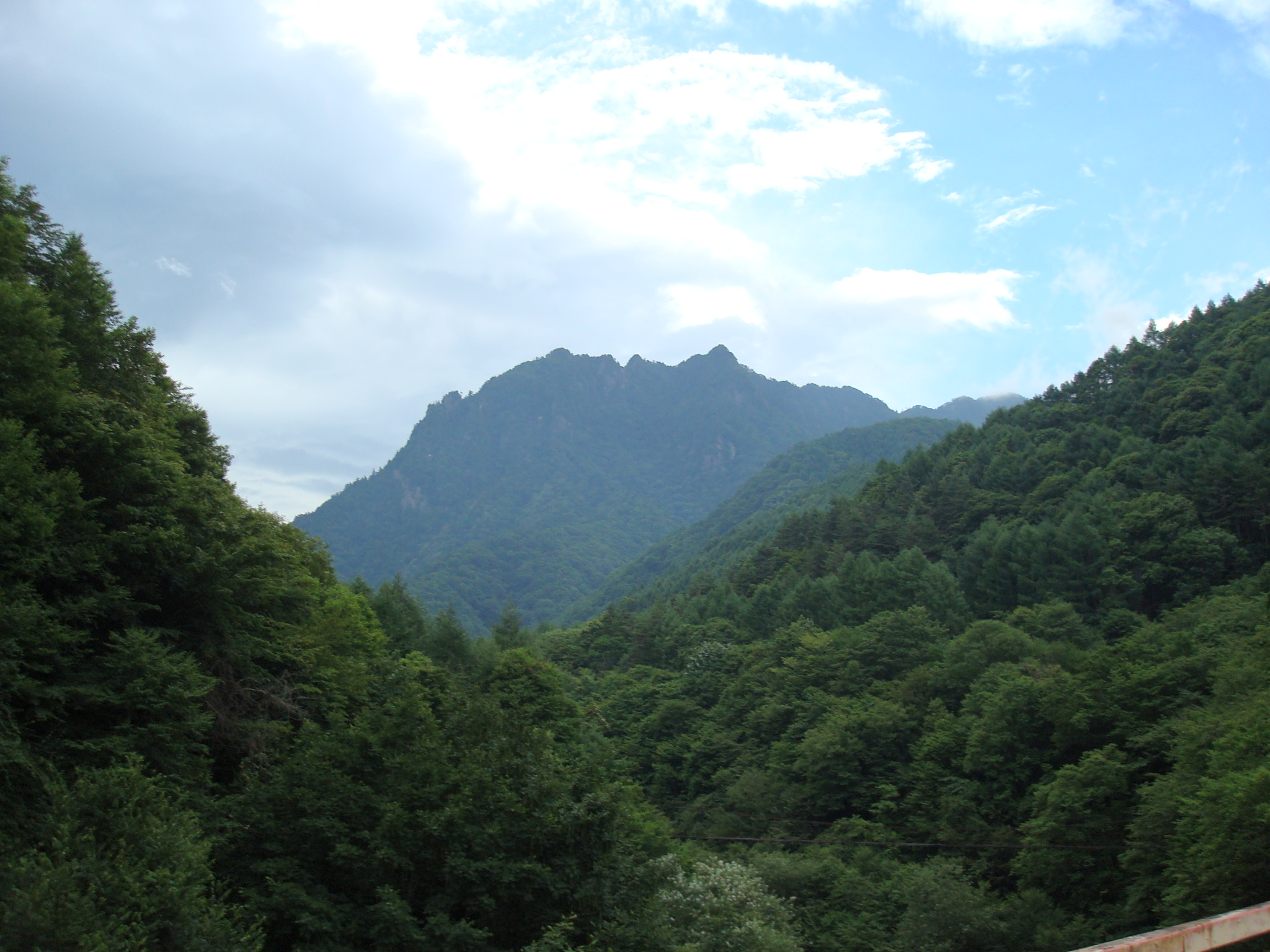 西沢渓谷から鶏冠山を望む